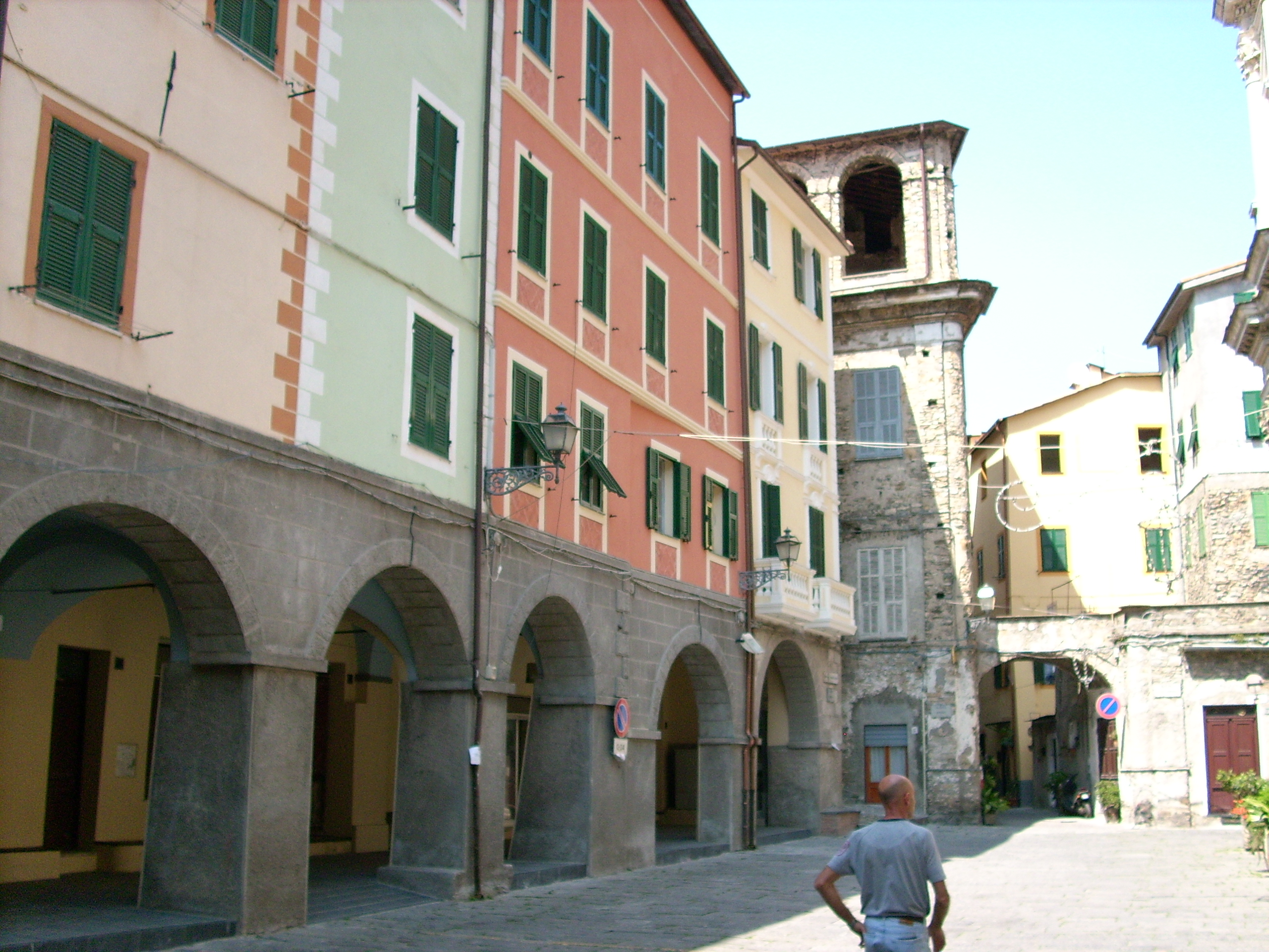 Badalucco, Liguria, Italia